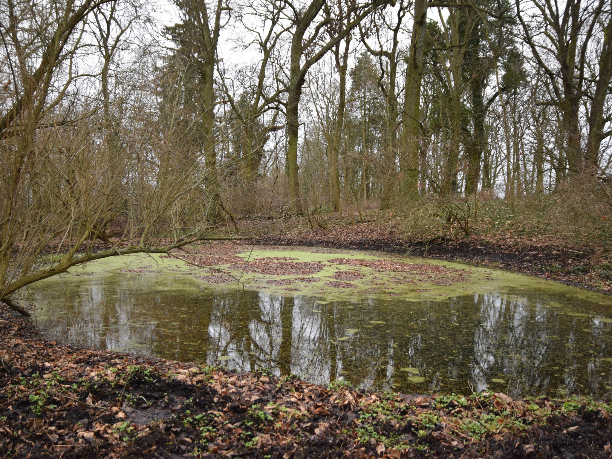 Teich im Gutshof Rosengarten